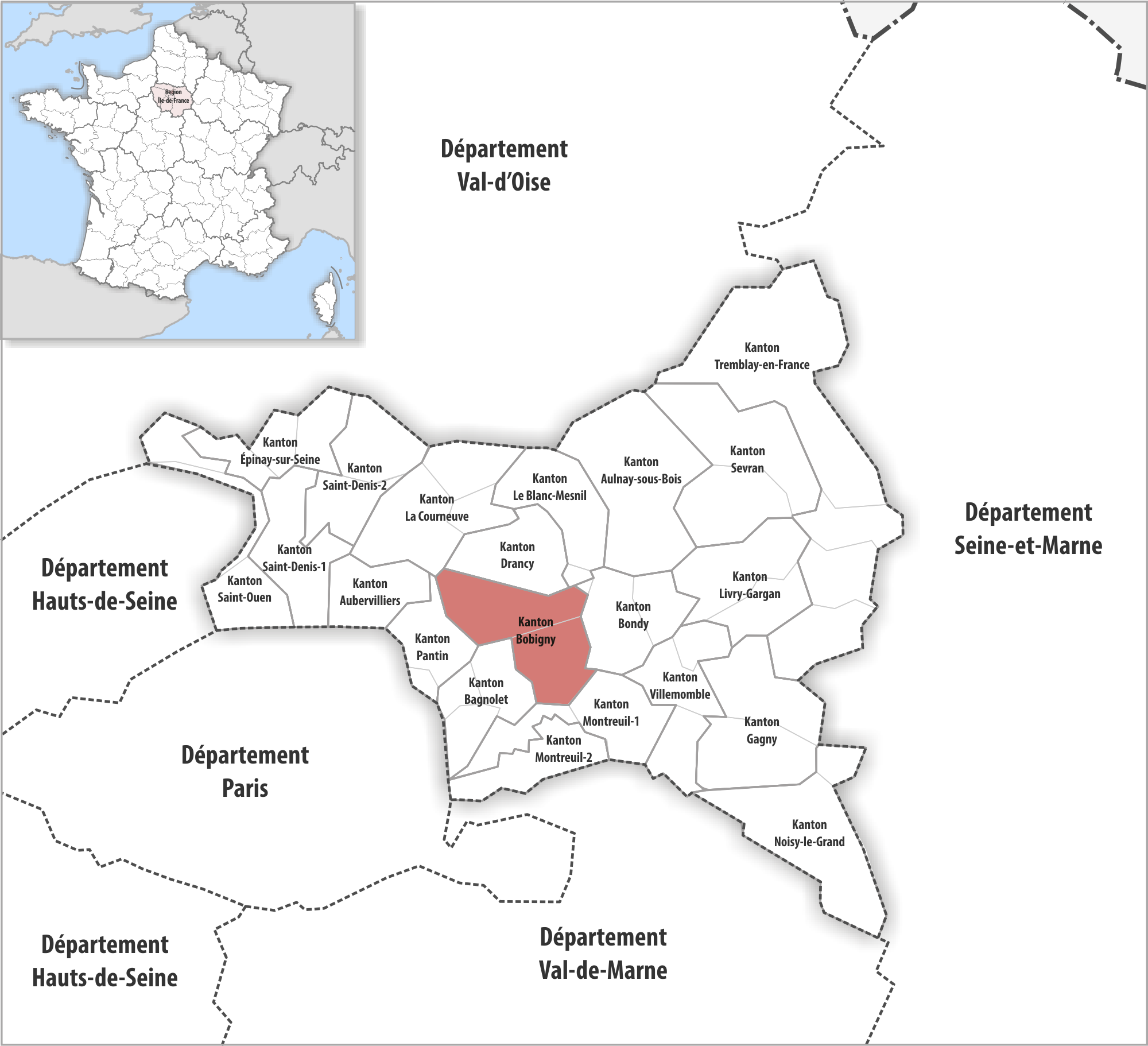 Lage des Kantons Bobigny